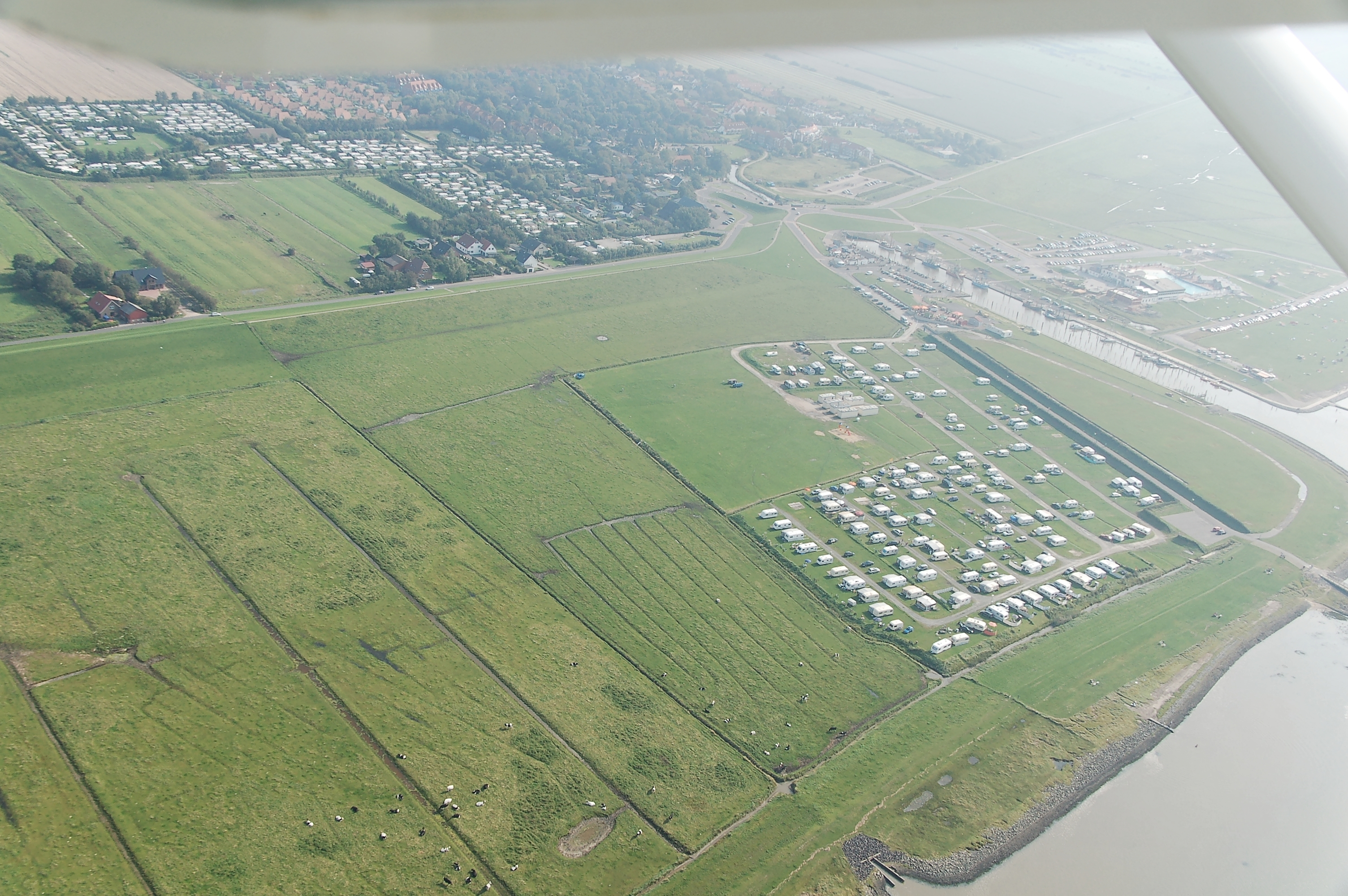 Impressionen Fotoflüge September 2011 (CPB), Dorum-Neufeld Dieses Foto entstand aufgrund eines Projektes, das von Wikimedia Deutschland e. V. gefördert wurde. Im Rahmen des „Community-Projektbudgets“ sollen Luftbilder u.a. von Inseln, Halligen, Sanden und Küstenorten der deutschen Nordseeküste angefertigt werden. Das Projekt „Fotoflüge“ wurde im September 2011 begonnen.